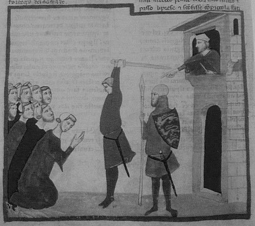 Poprava Tomáše z Lancasteru